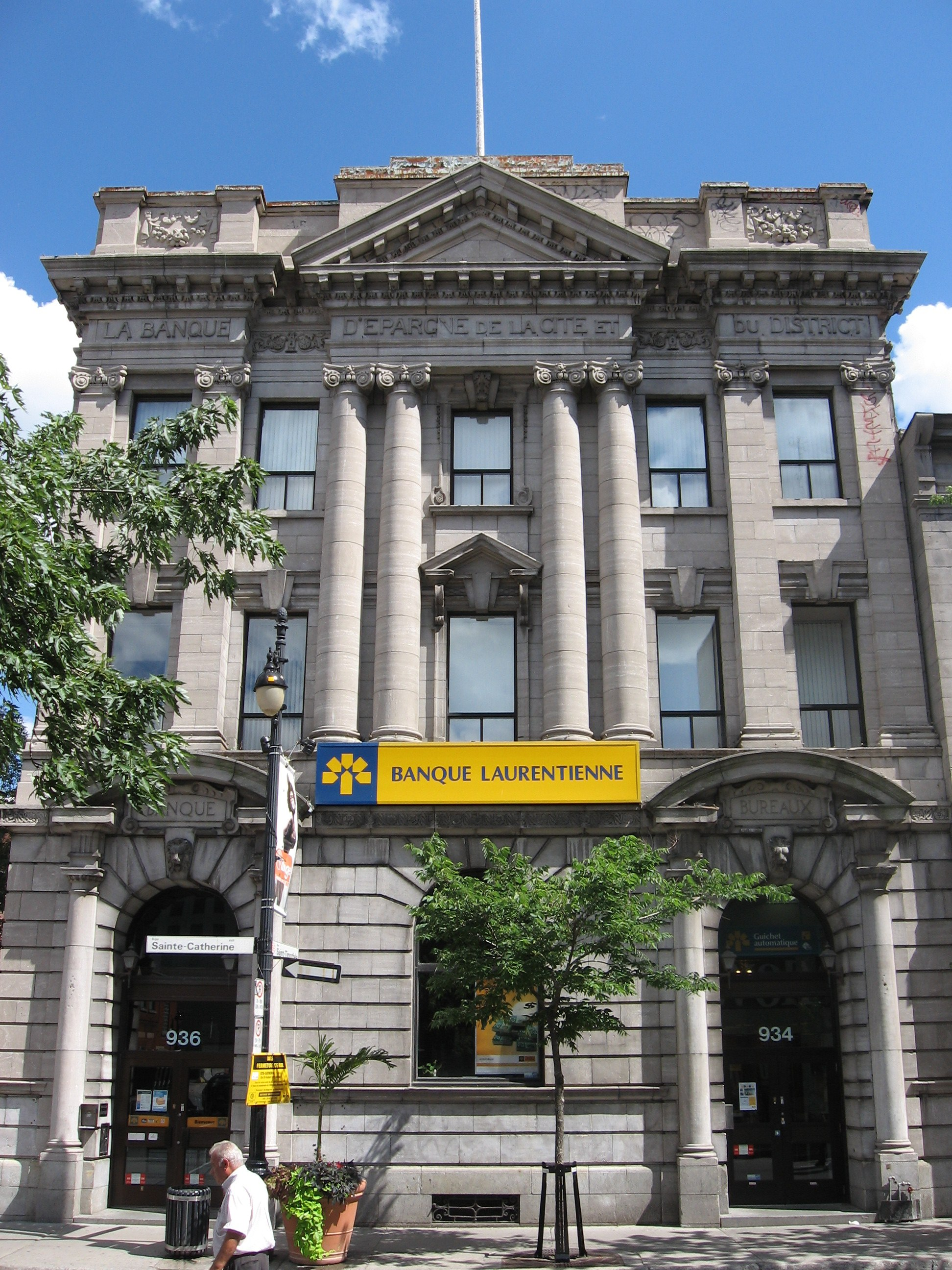 Laurentian Bank of Canada branch located on the corner of Saint Catherine Street and Saint Timothée, in the Gay Village, Montreal. Succursale de la Banque Laurentienne du Canada situé au coin des rues Sainte-Catherine et Saint-Thimothé dans le Village Gay à Montréal.